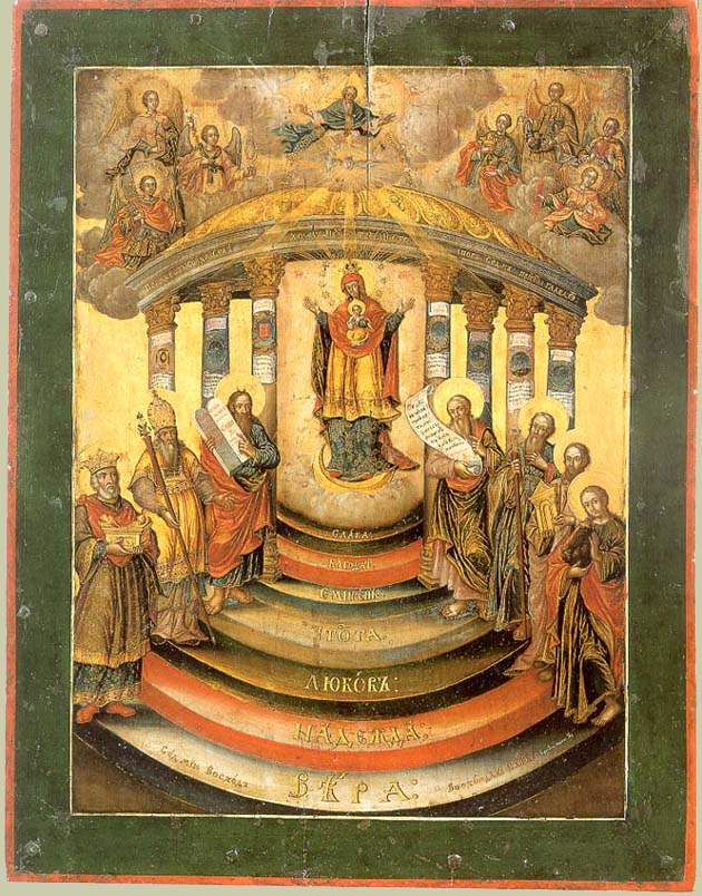 София Премудрость Божия. XVIII век. Музей-заповедник «Коломенское»